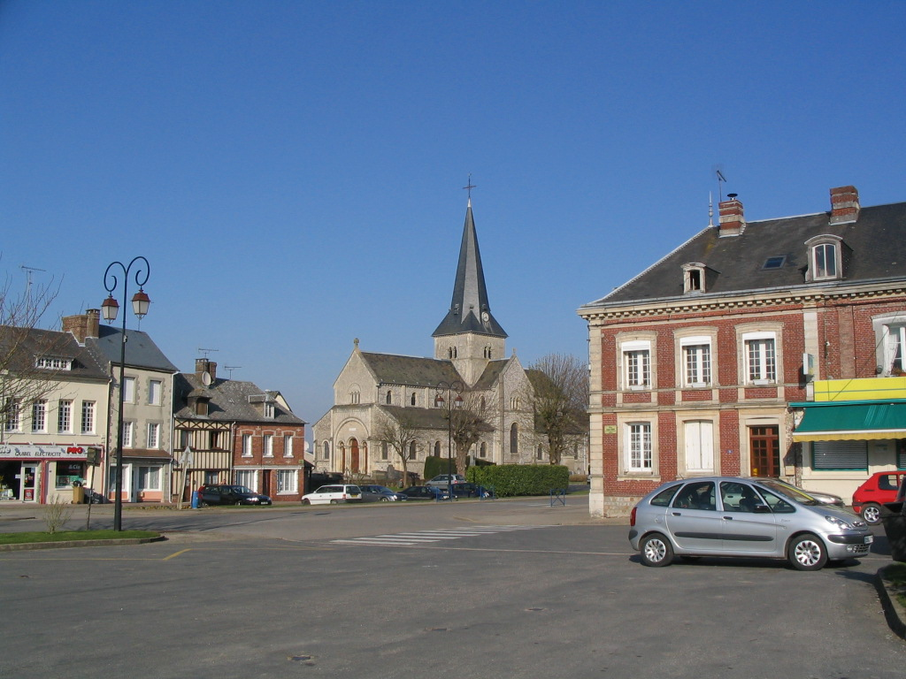 La place du village de Saint-Laurent-en-Caux, France.